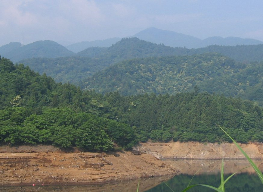 宮ヶ瀬湖畔から見た御殿森ノ頭（中央手前）。左は高畑山で、御殿森ノ頭の右後にやや霞んで見えるのが東峰。